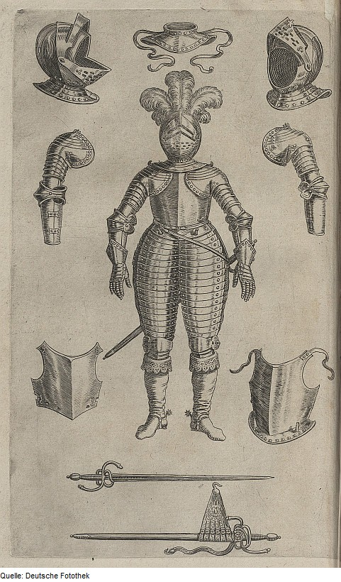 Original image description from the Deutsche FotothekKriegskunst & Rüstung & Waffe & Lanzierer